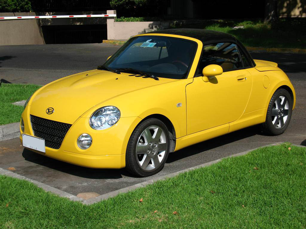 Daihatsu Copen 2008